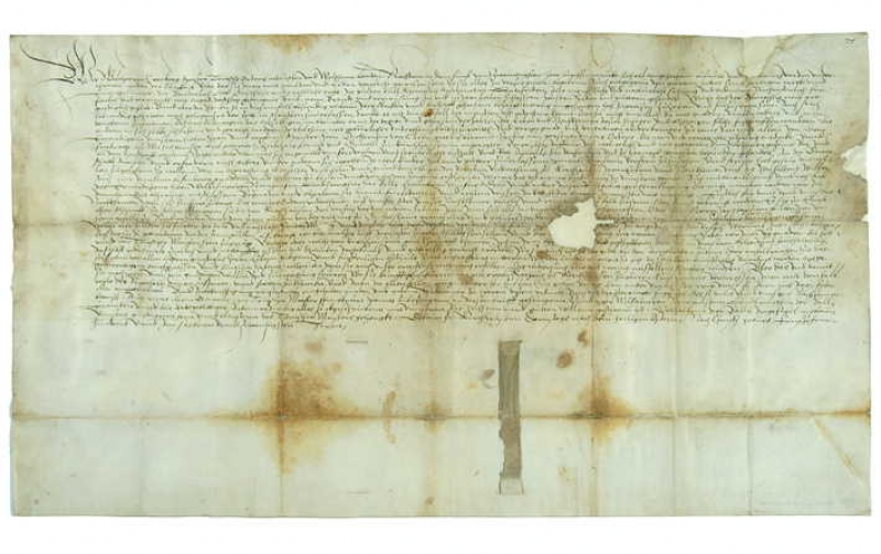 s.o.